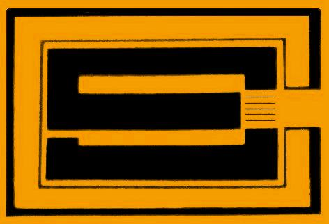 Logotipo del Centro de Estudios Socio-Económicos de la Universidad de Chile